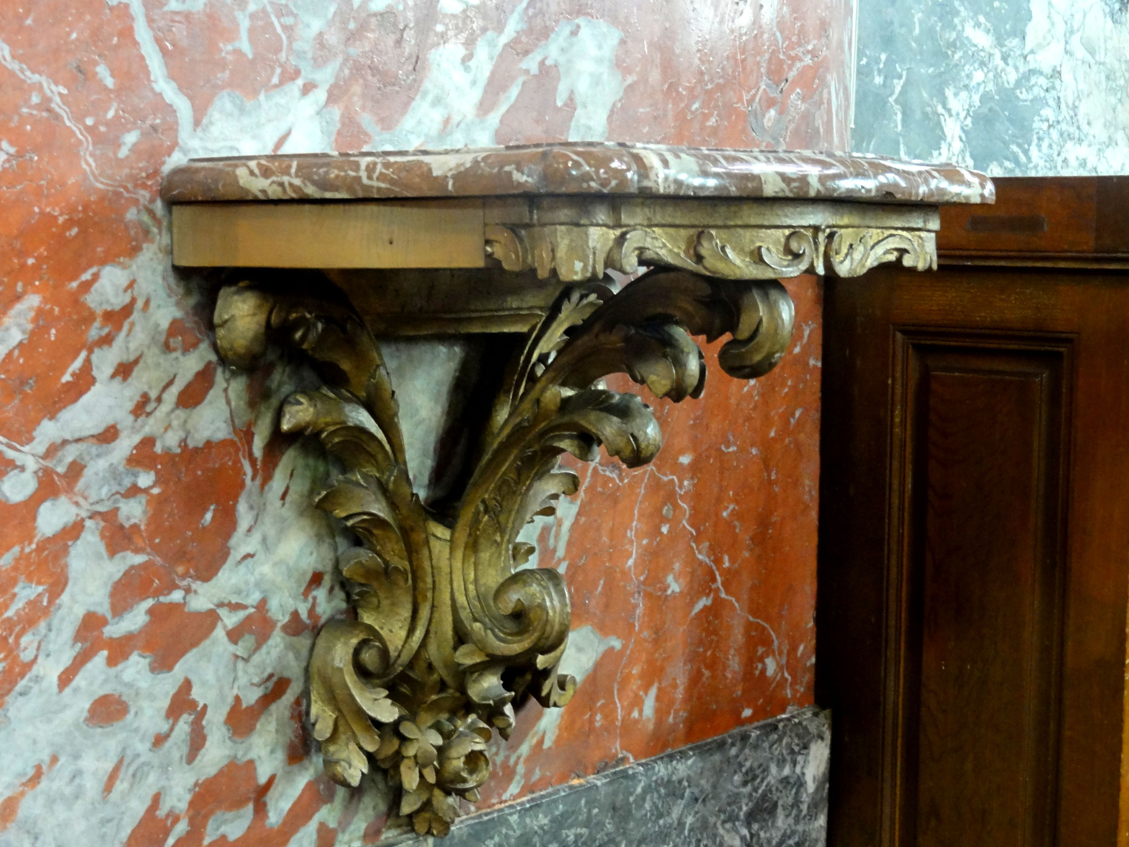 Crédence du chœur.